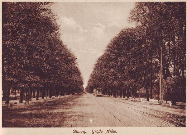 Wielka Aleja (Aleja Zwycięstwa) w Gdańsku.